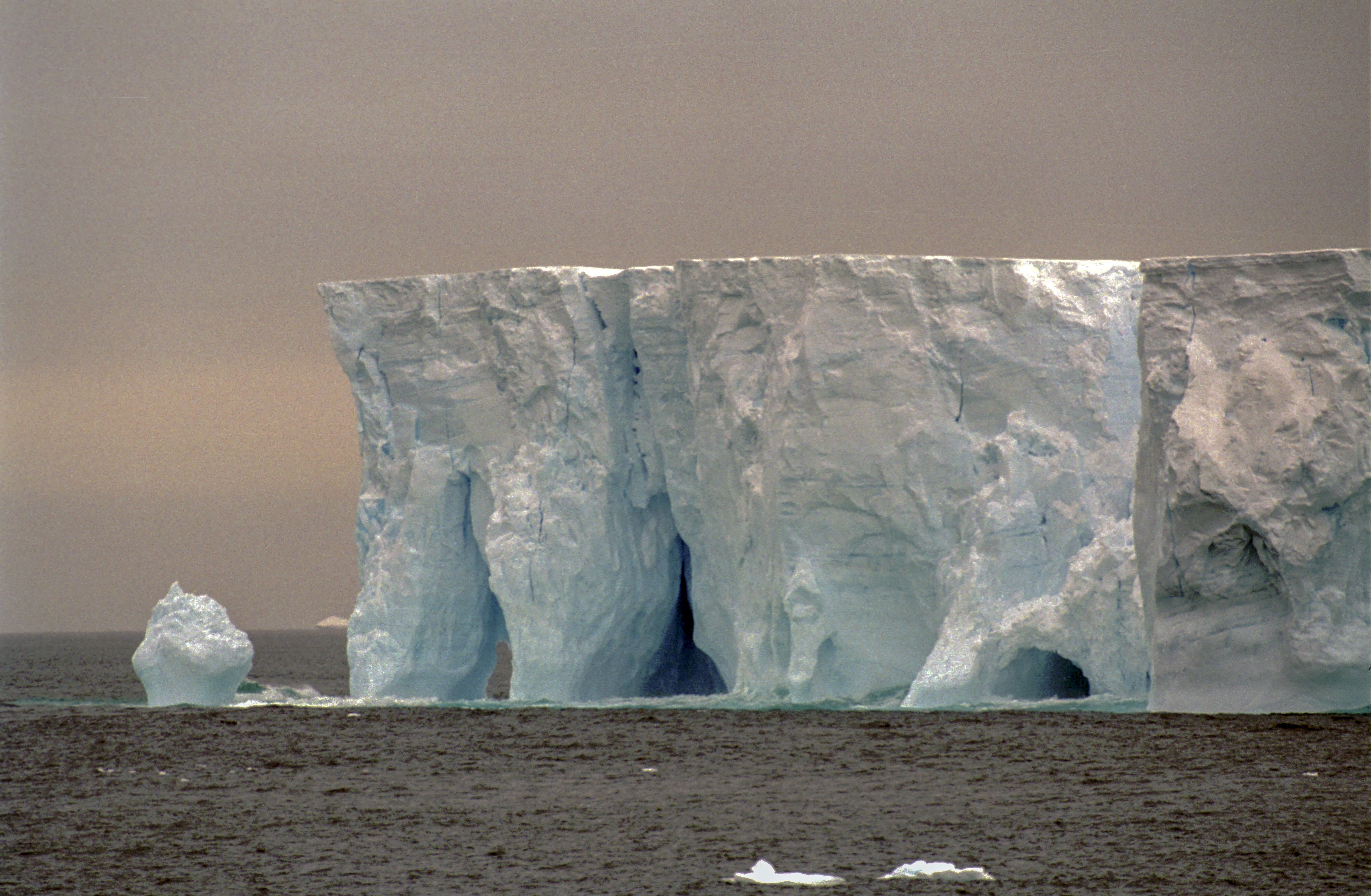 Antarctica, iceberg